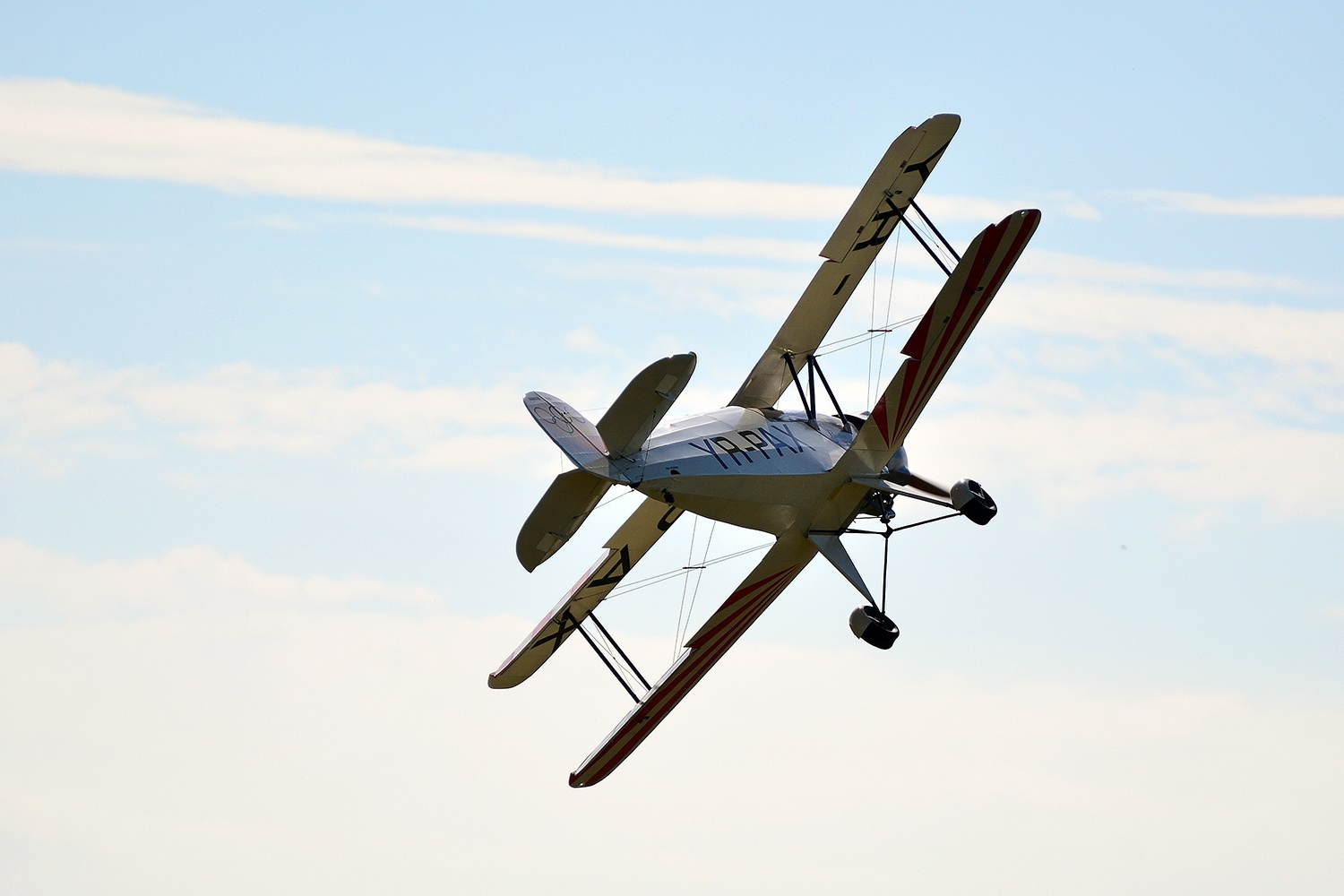 Bü133 Jungmeister YR-PAX, Flugplatz, Hamm, Westfalen, Datum/Uhrzeit: 04.08.2013 10:16:17